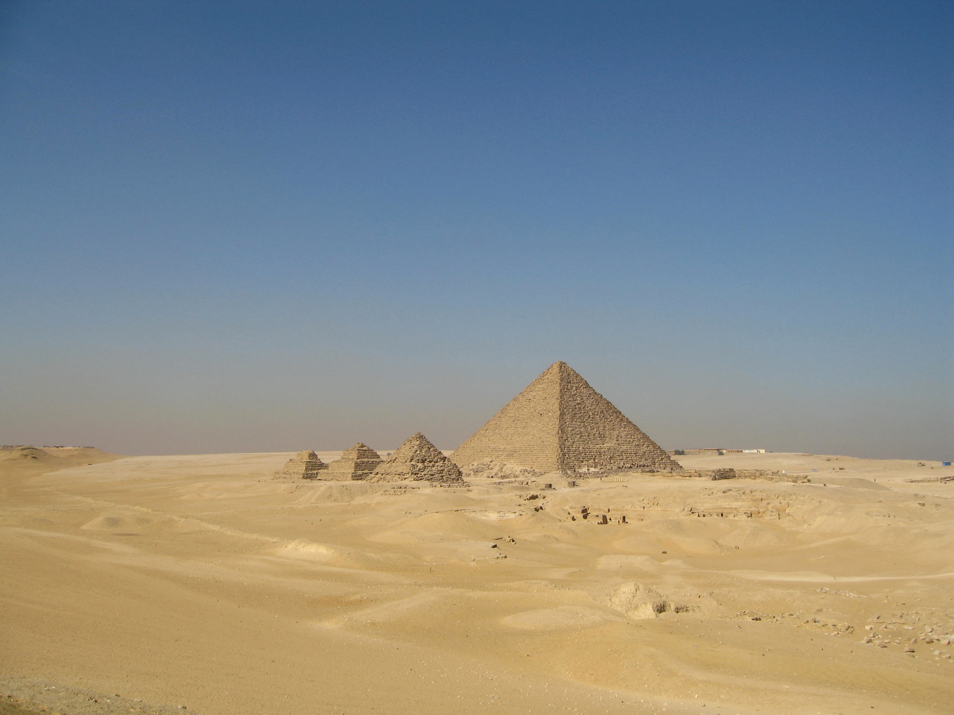 Menkaure-Pyramid and queens pyramids